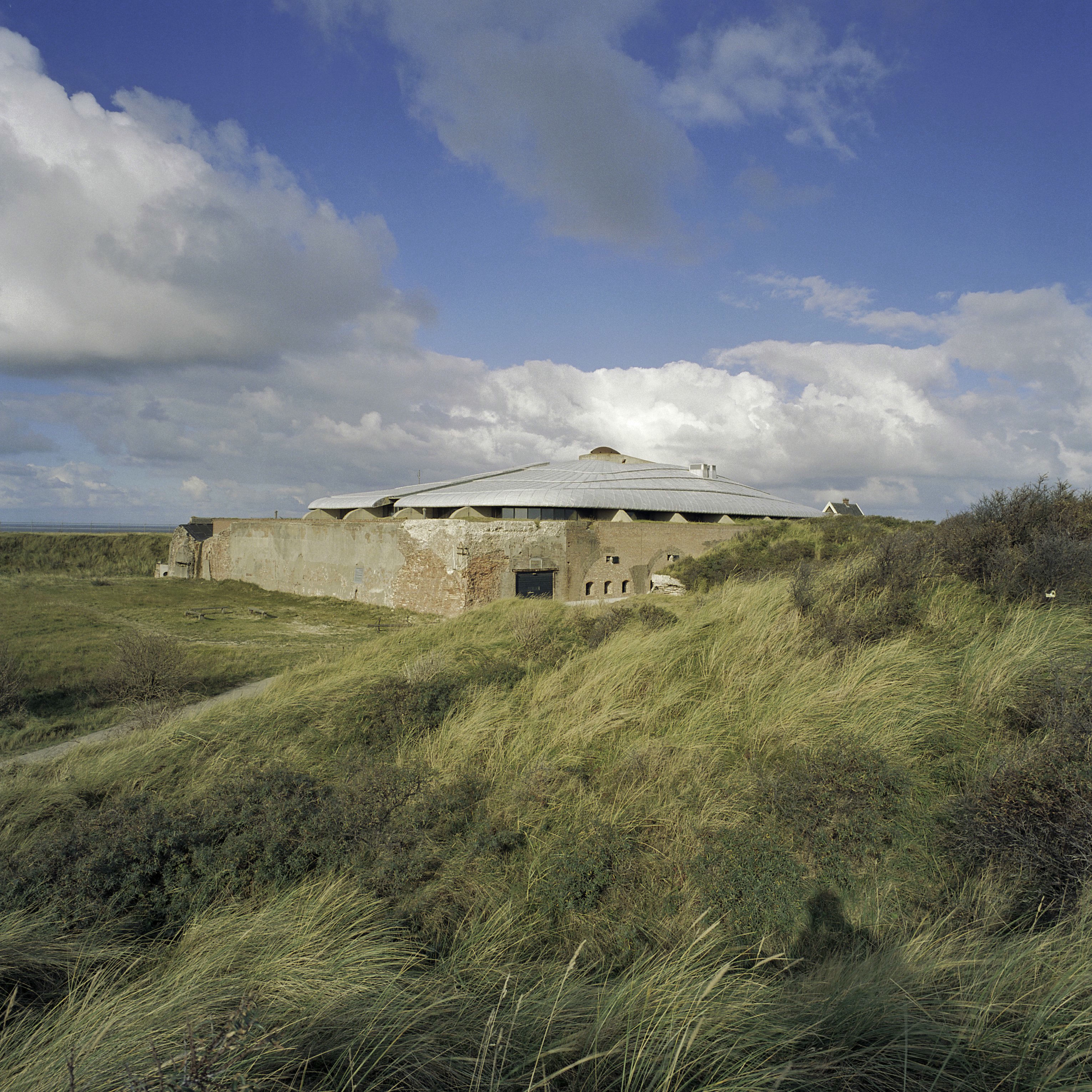 Fort Kijkduin: Overzicht oostelijk front (opmerking: Gefotografeerd voor Monumenten In Nederland Noord-Holland)